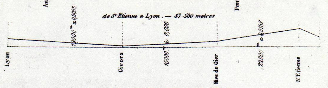 carte